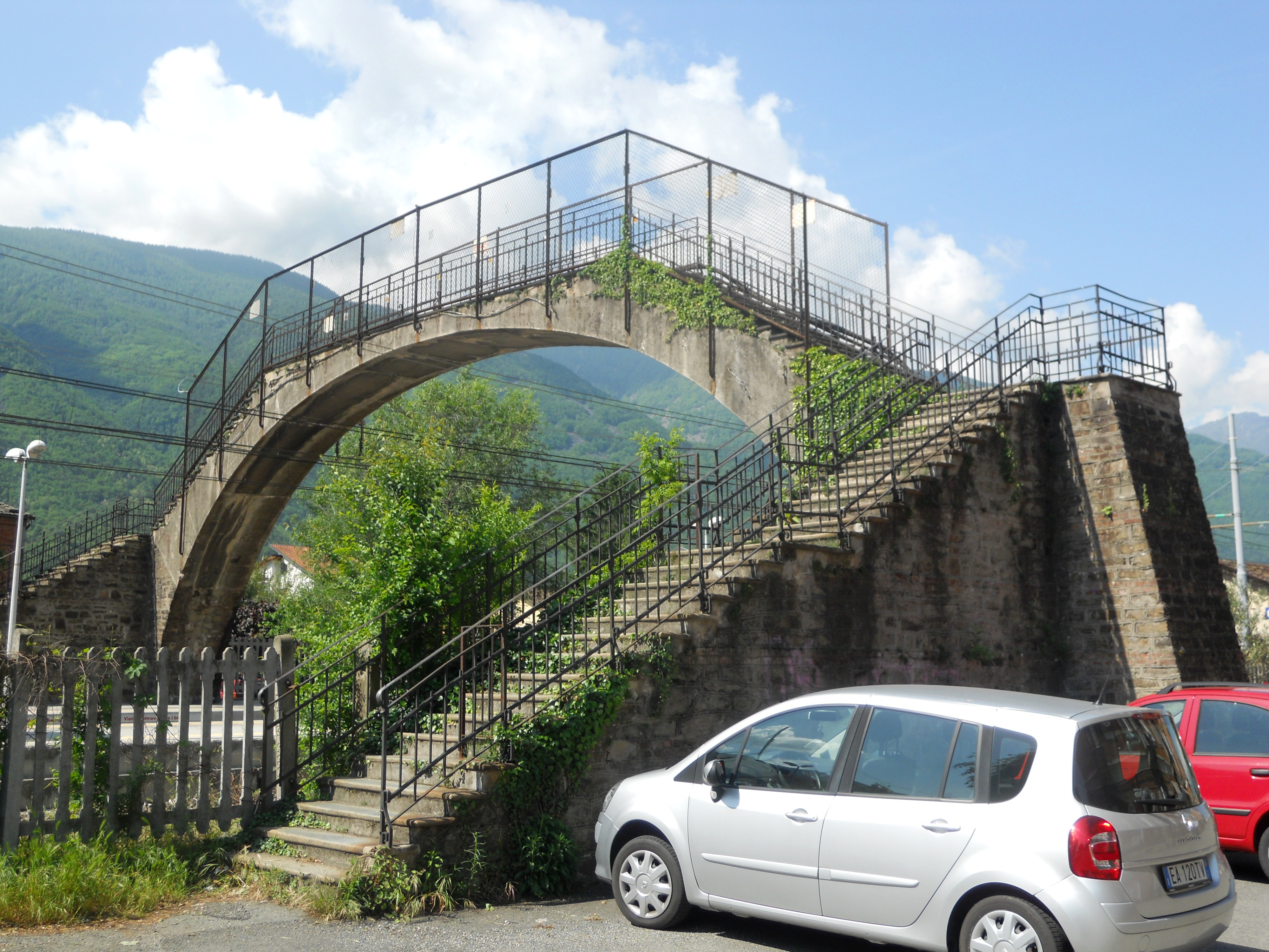 Ponte in muratura che scavalca i binari